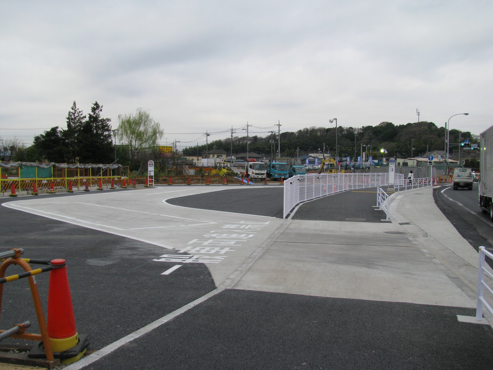 横浜市営地下鉄グリーンライン東山田駅